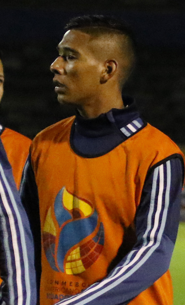 ARGENTINA URUGUAY 1 MAV